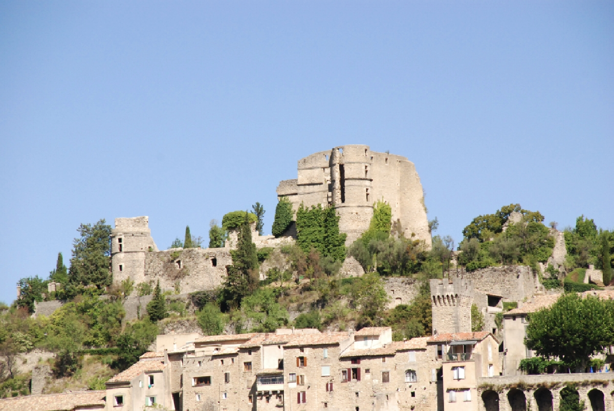 Montbrun-les-Bains-bourg